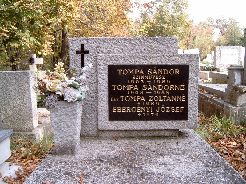 Tompa Sándor, Tompa Pufi (Kézdivásárhely, ma Targu Secuiesc, Romania, 1903. december 22. – Bp. 1969. december 19.) színész sírja Budapesten. Farkasréti temető: 20/2-1-275.